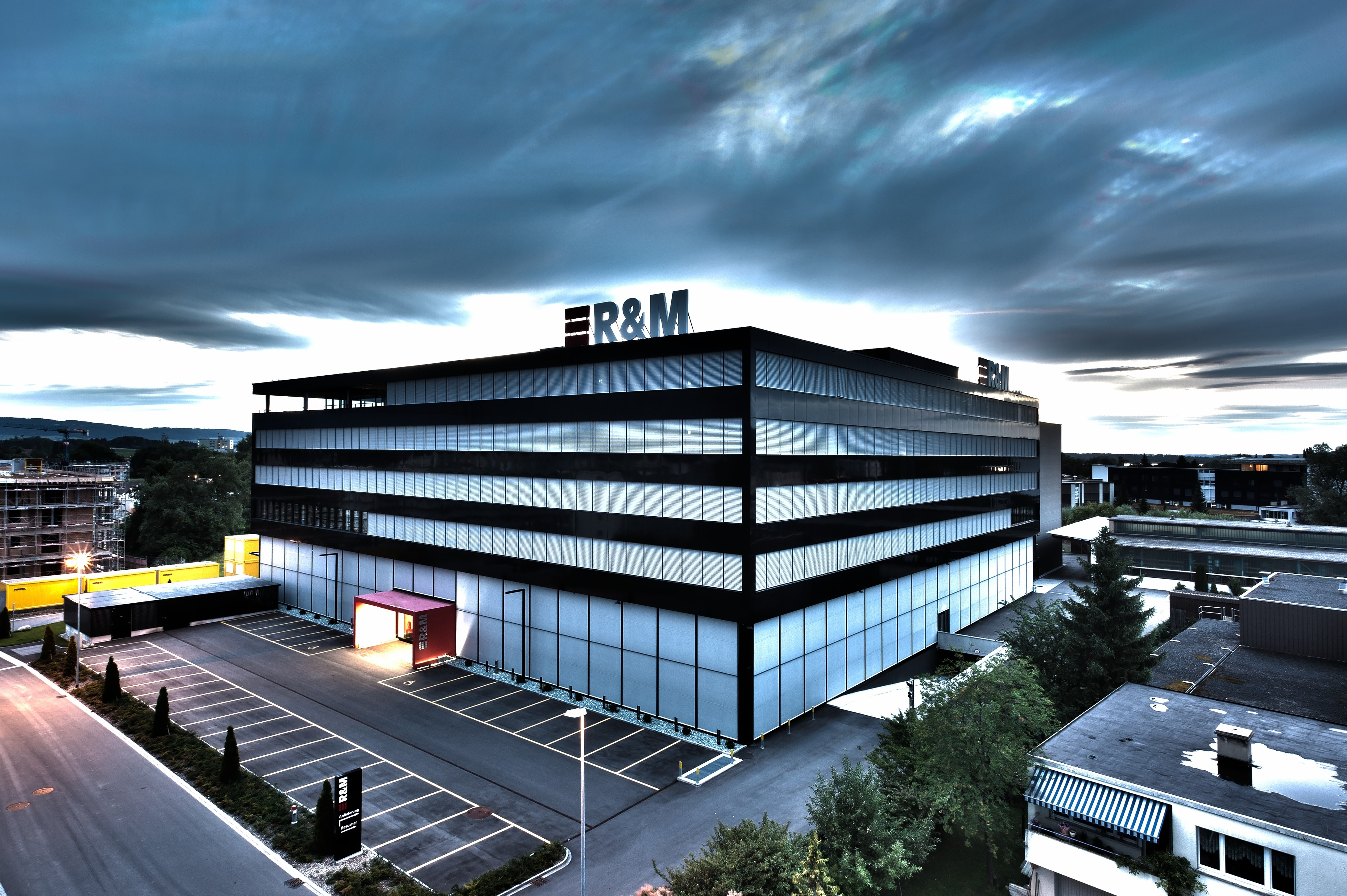 Reichle & De-Massari Hauptgebäude "Kubus" in Wetzikon (ZH), Schweiz